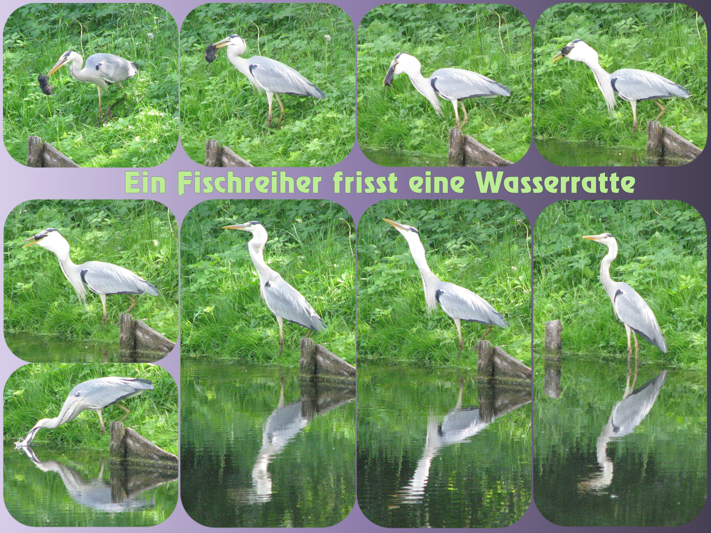 Ein Fischreiher fängt und frisst eine Wasserratte, indem er sie im Ganzen verschlingt. Die Wasserratte bewegte sich kaum, möglicherweise eine Art von Schockstarre. Vor dem endgültigen Schlucken nimmt der Fischreiher noch ein wenig Wasser zu sich. Deutlich ist auf den Fotos der Körper der Ratte im Hals des Reihers zu erkennen. Dauer des gesamten Vorganges etwa 1 Minute. Ort: Park des Schlosses Sansoussi in Potsdam.(höhere Auflösung verfügbar)